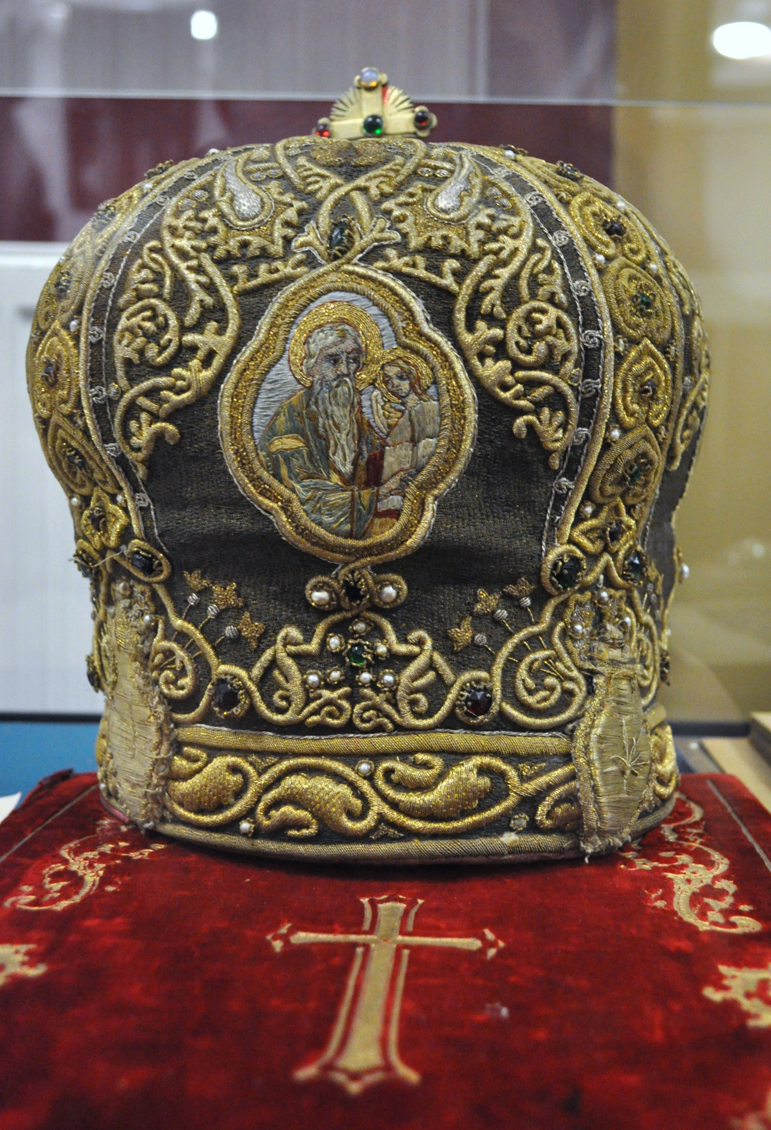 Exponat din colecția dedicată episcopului Nicolae Ivan în muzeul Arhiepiscopiei Clujului